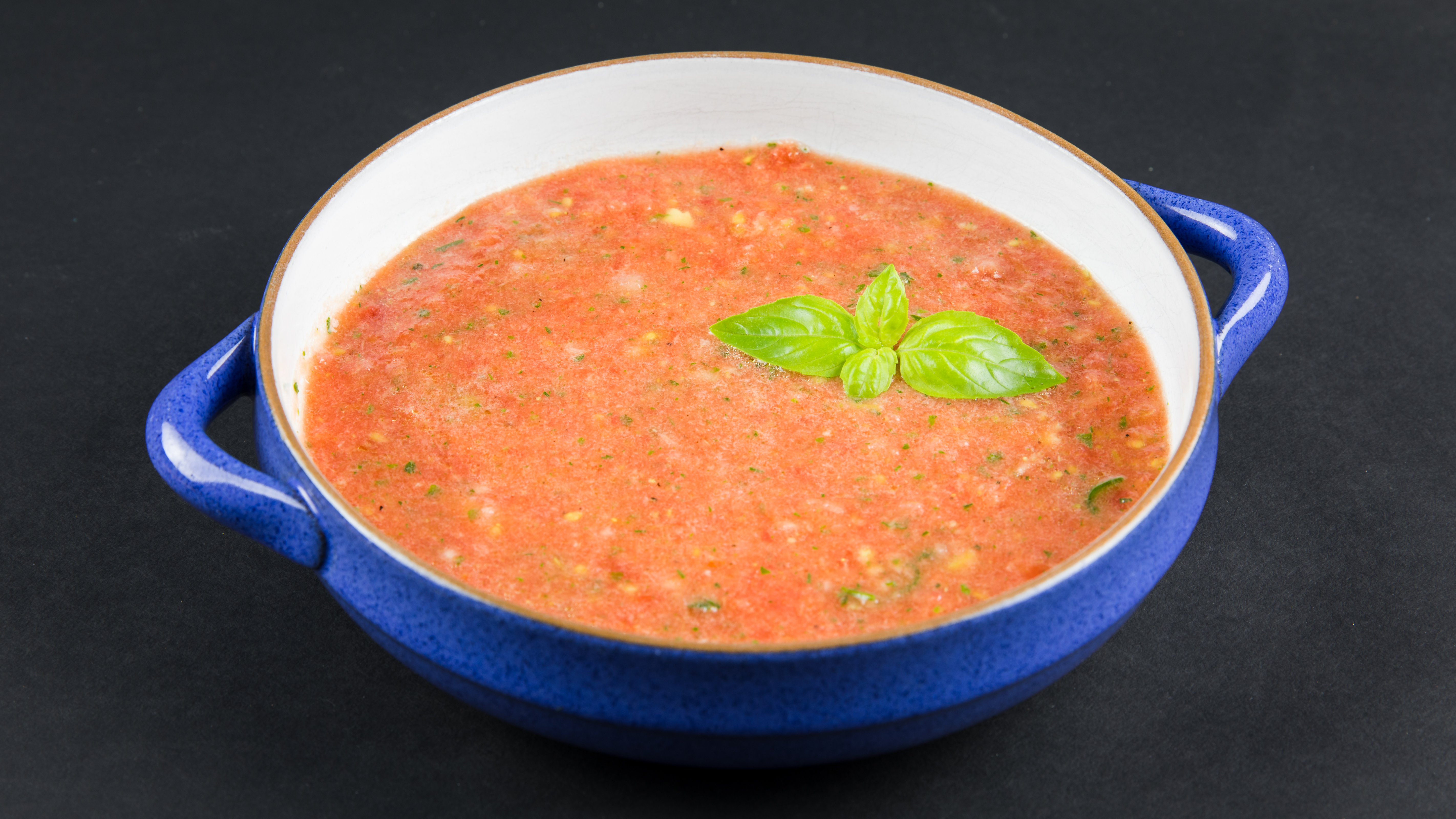 Gazpacho (Kalte Gemüsesuppe mit Tomaten, Zwiebeln, Pepperoni)